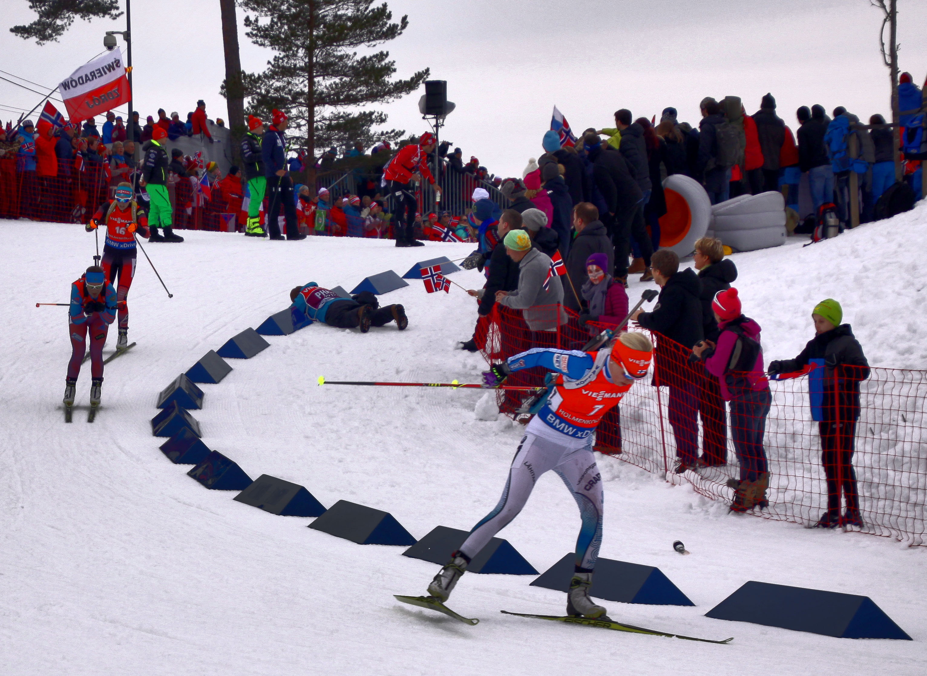 Oslo. Kaisa Mäkäräinen aux championnats du monde de biathlon.